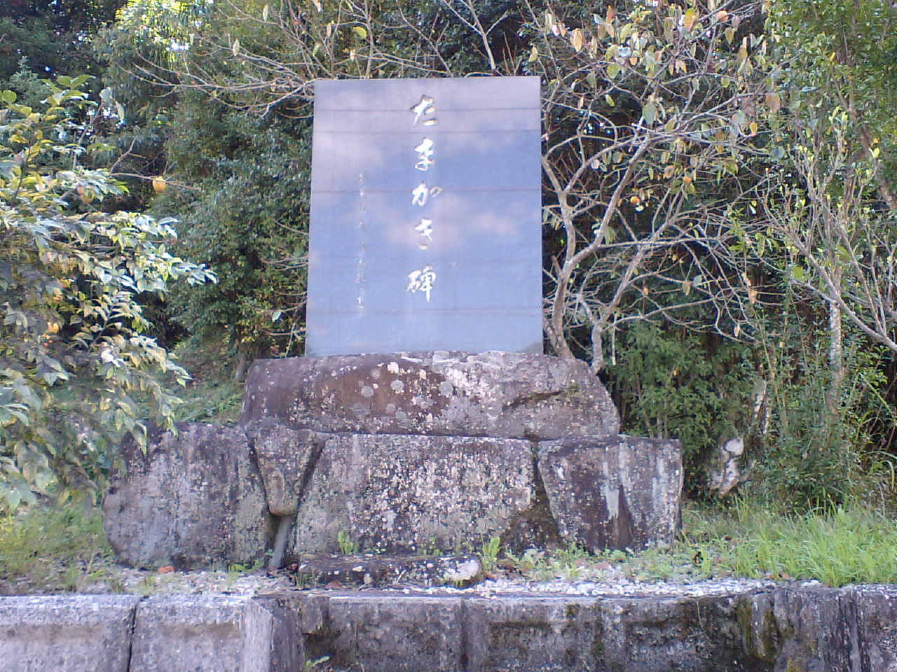 新見市西方にある「たまがき」の生家跡の「たまがきの碑」